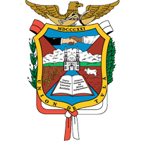 escudo de armas de union de tula